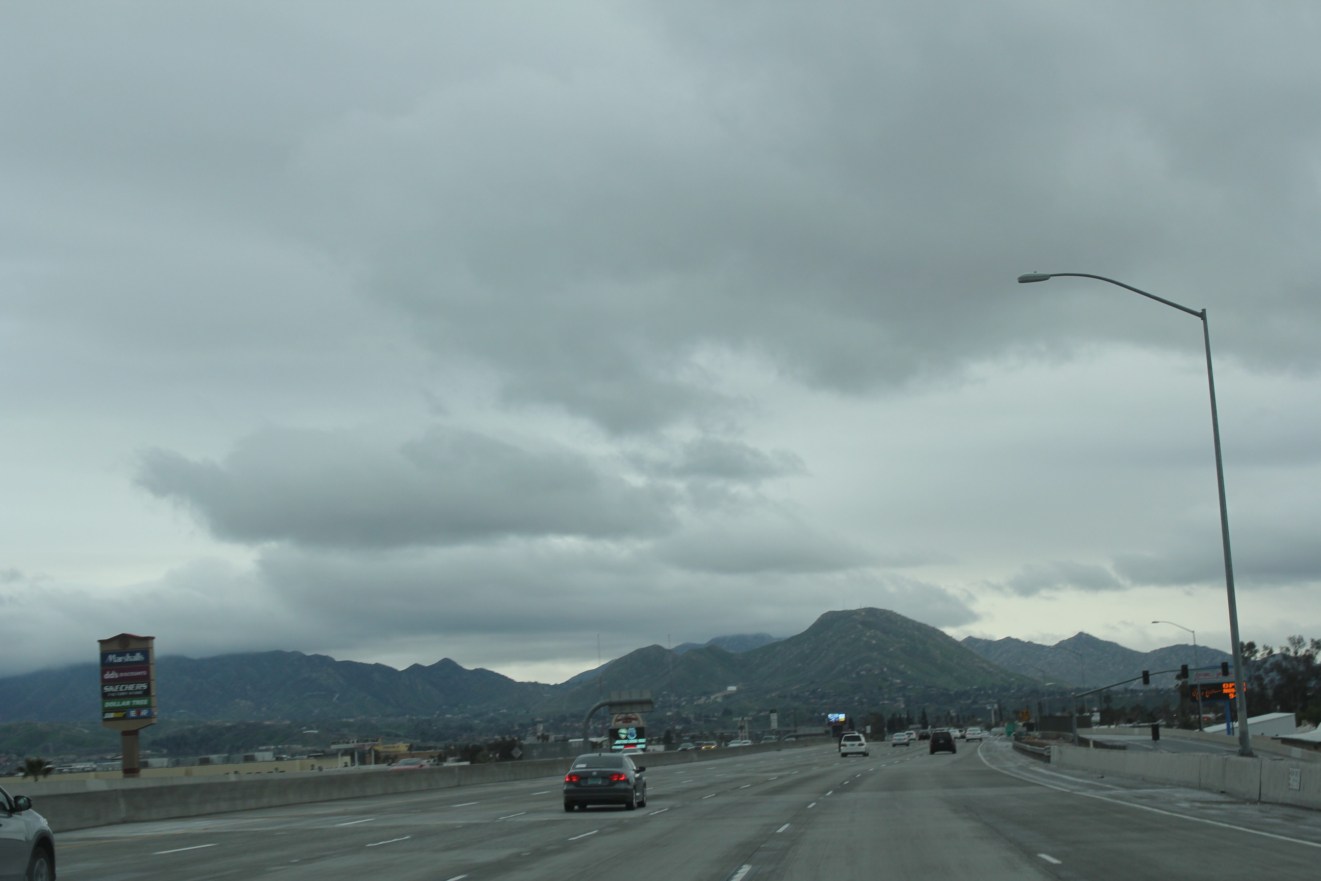 215 en San Bernadino, CA.